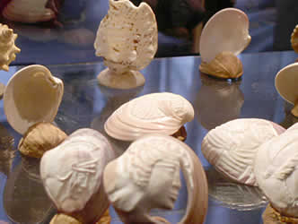 Foto de miniaturas